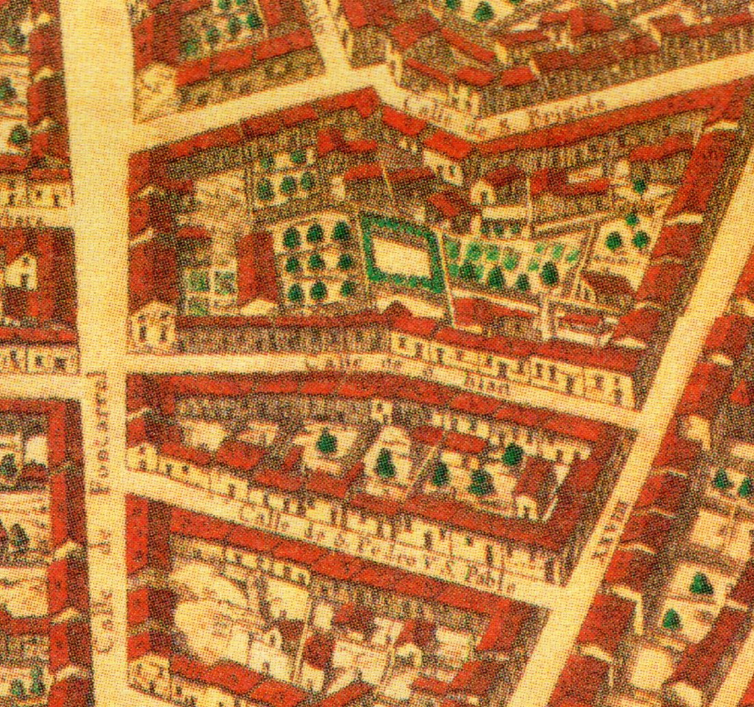 Topografía de la Villa de Madrid descrita por Don Pedro Texeira en 1656, en la cual se demuestran todas las calles al largo y ancho de cada una de ellas, las rinconadas y lo que tuercen las Plazas, fuentes, jardines y huertas con la disposición que tienen las parroquias, Monasterios y Hospitales están señalados sus nombres con letras y números que se hallaran en la tabla y los demás edificios, torres y delanteras de las casas de la parte que mira al Mediodía están sacadas al natural que se podrán tocar las puertas y ventanas de cada una de ellas.